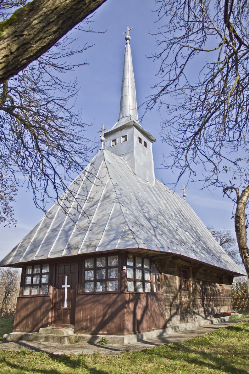 Biserica de lemn din Negreni, judeţul Sălaj.